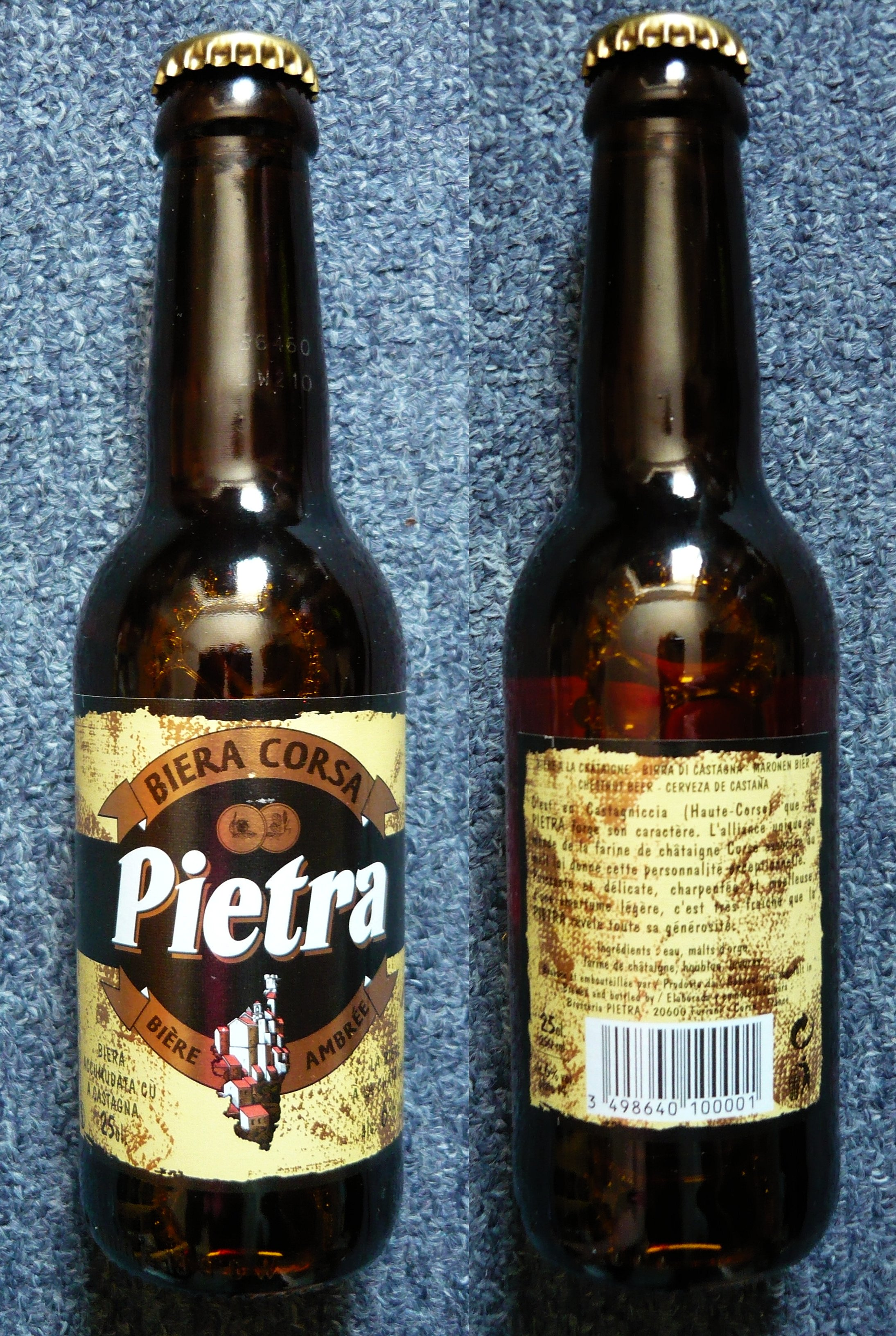 Corsu: Pietra biera corsa